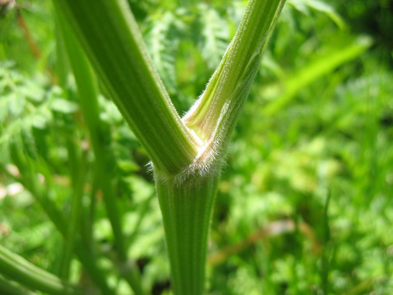 Wiesen-Kerbel Anthriscus sylvestris, Rügen